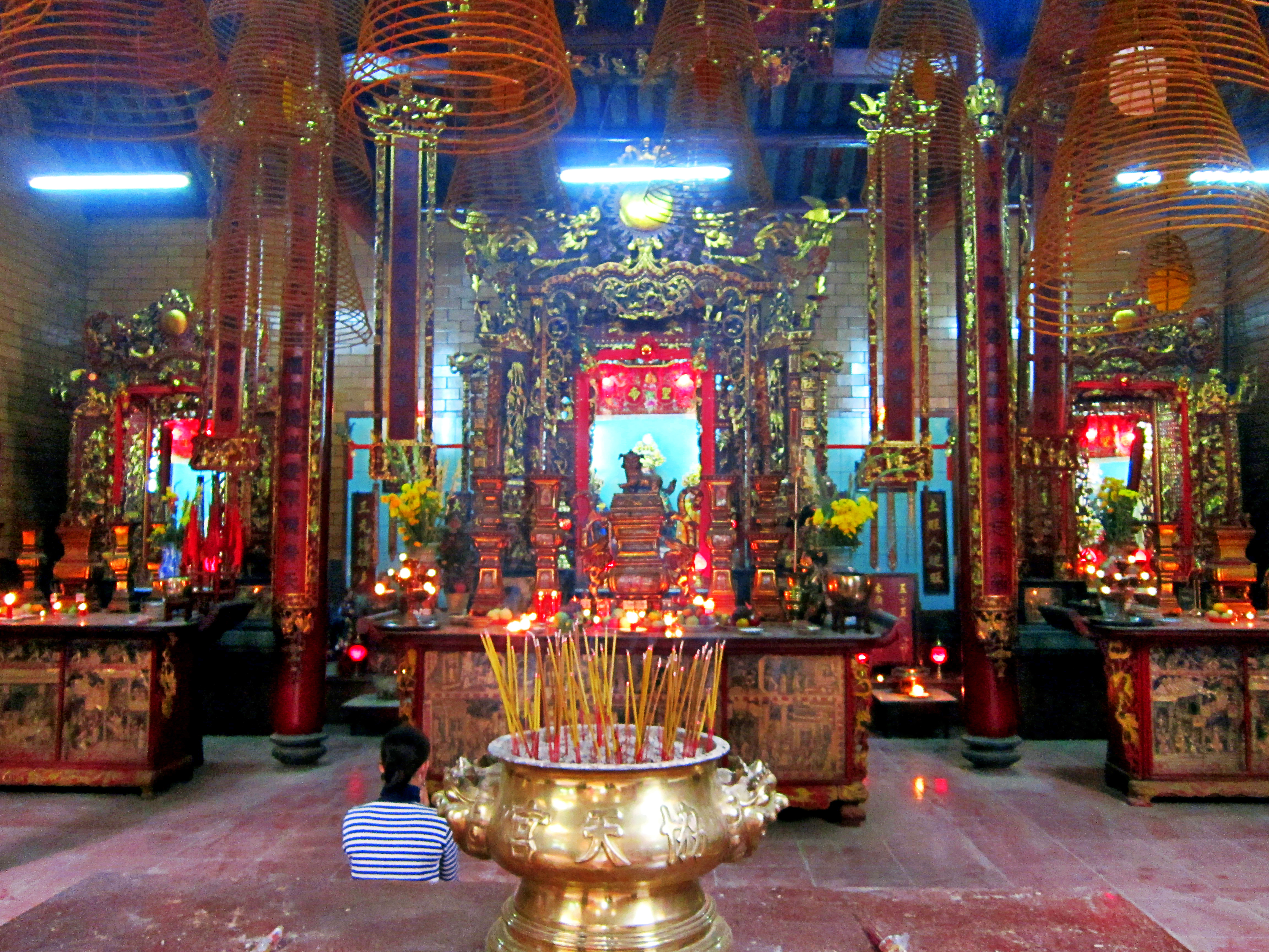 Chính điện Chùa Ông (tên gốc là Quảng Triệu Hội Quán); tọa lạc tại số 32 đường Hai Bà Trưng, thuộc phường Tân An, quận Ninh Kiều, thành phố Cần Thơ, Việt Nam.